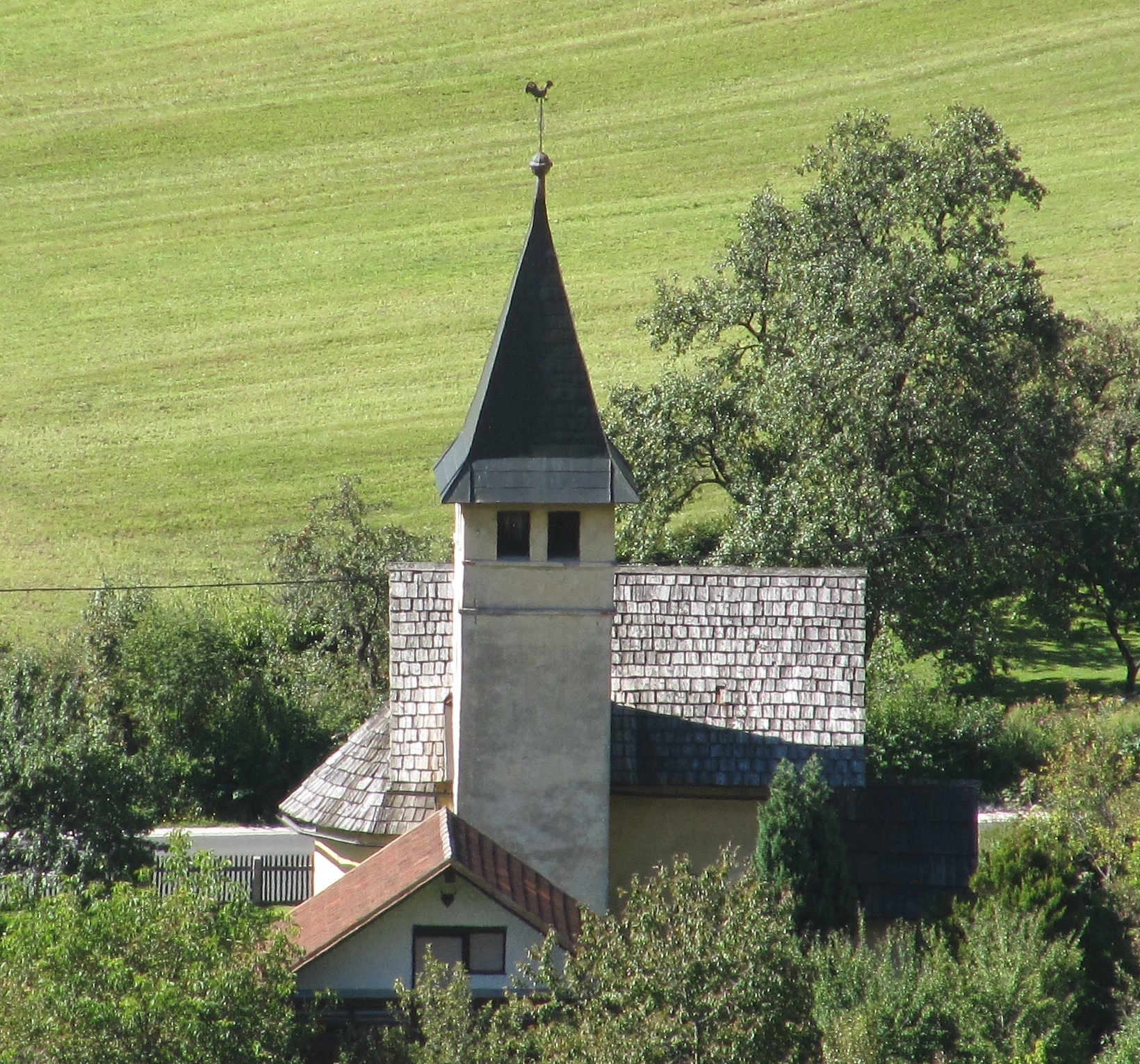 Kapela Srca Jezusovega, Gozd Martuljek, Slovenia